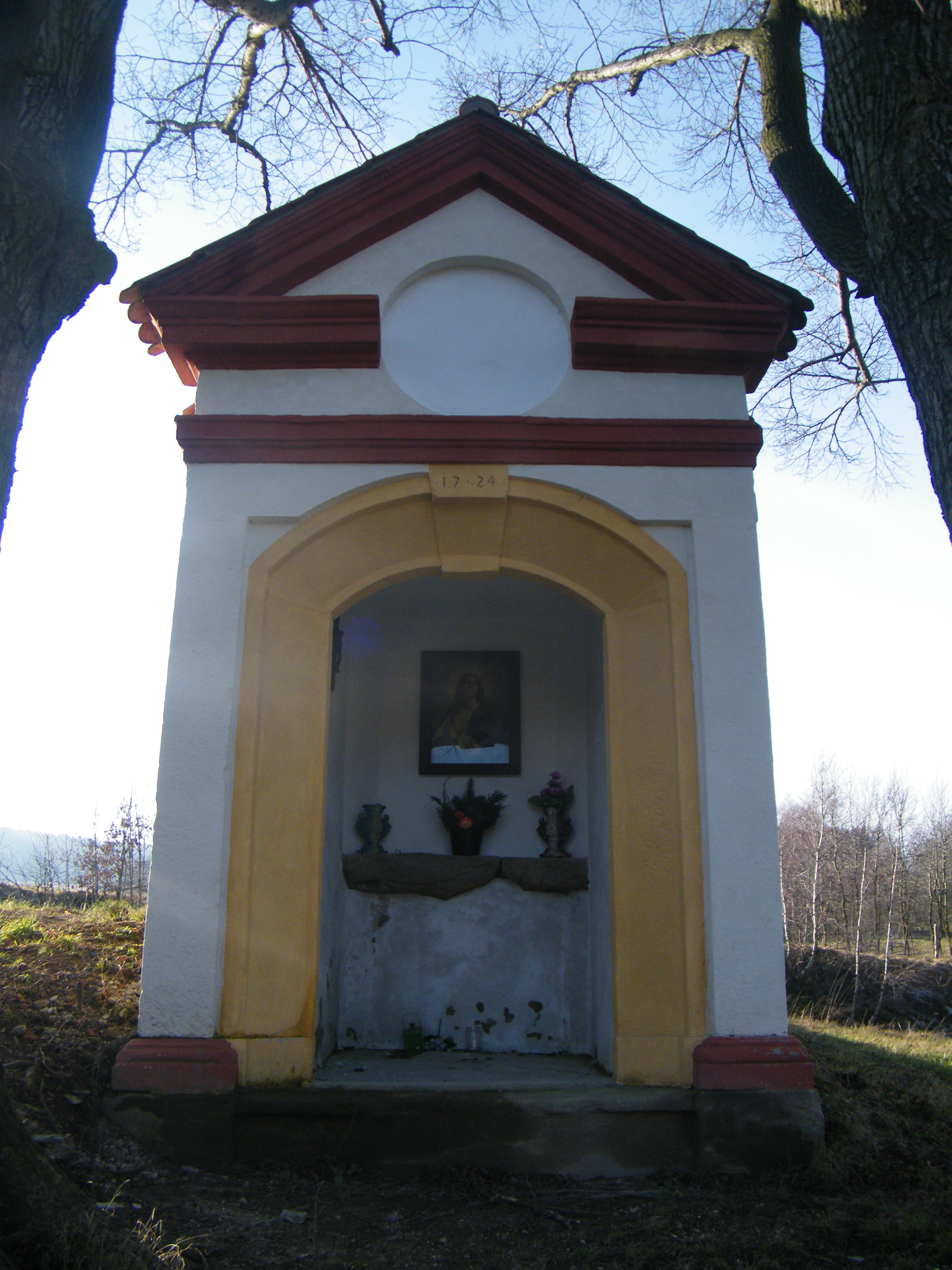 Balzerova kaple Mikulášovice (2013)